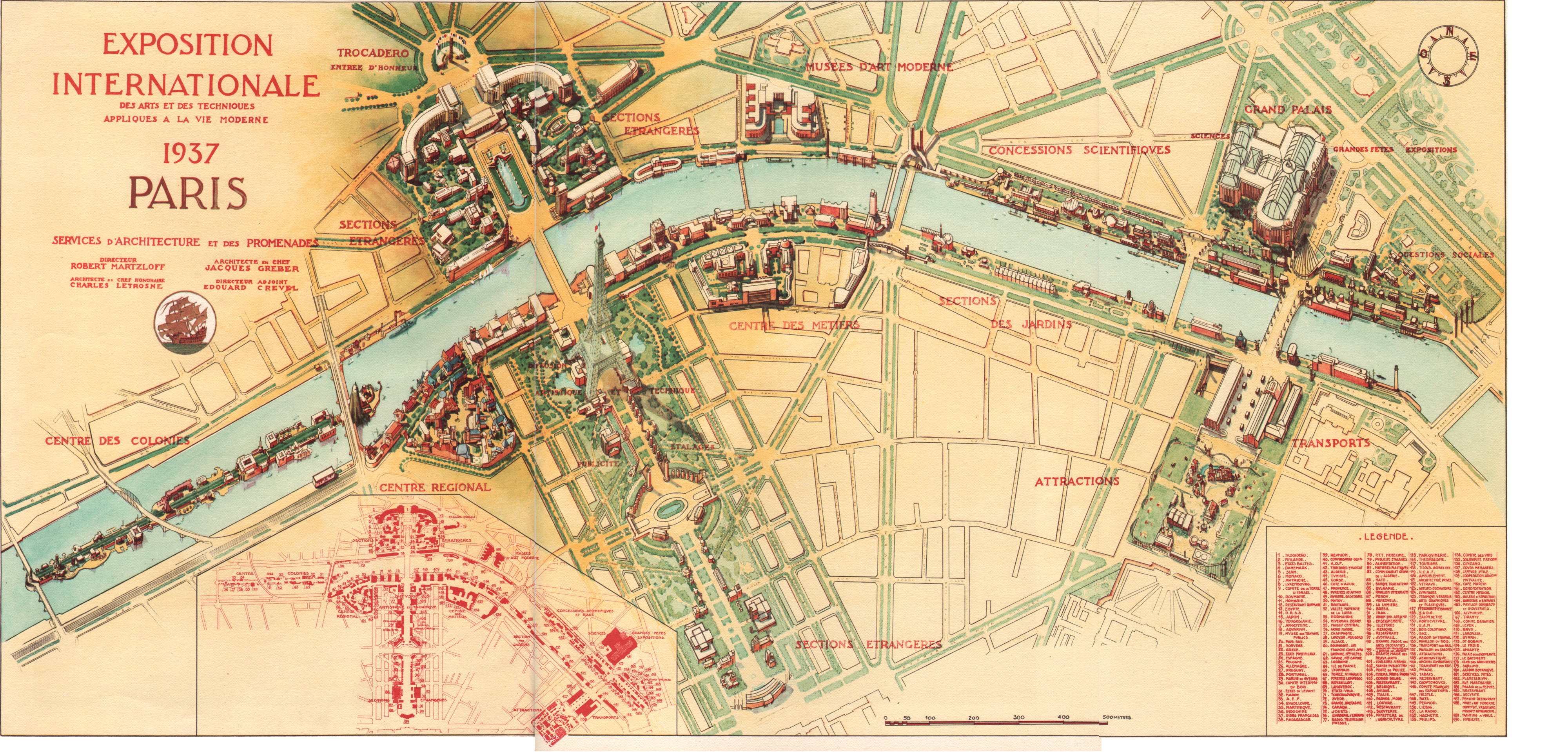 Plan détaillé offert par le mensuel français L'Illustration dans un numéro spécial publié en mai 1937.